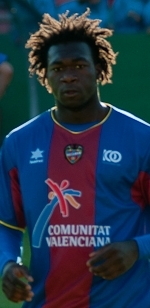 El jugador granota Felipe Caicedo